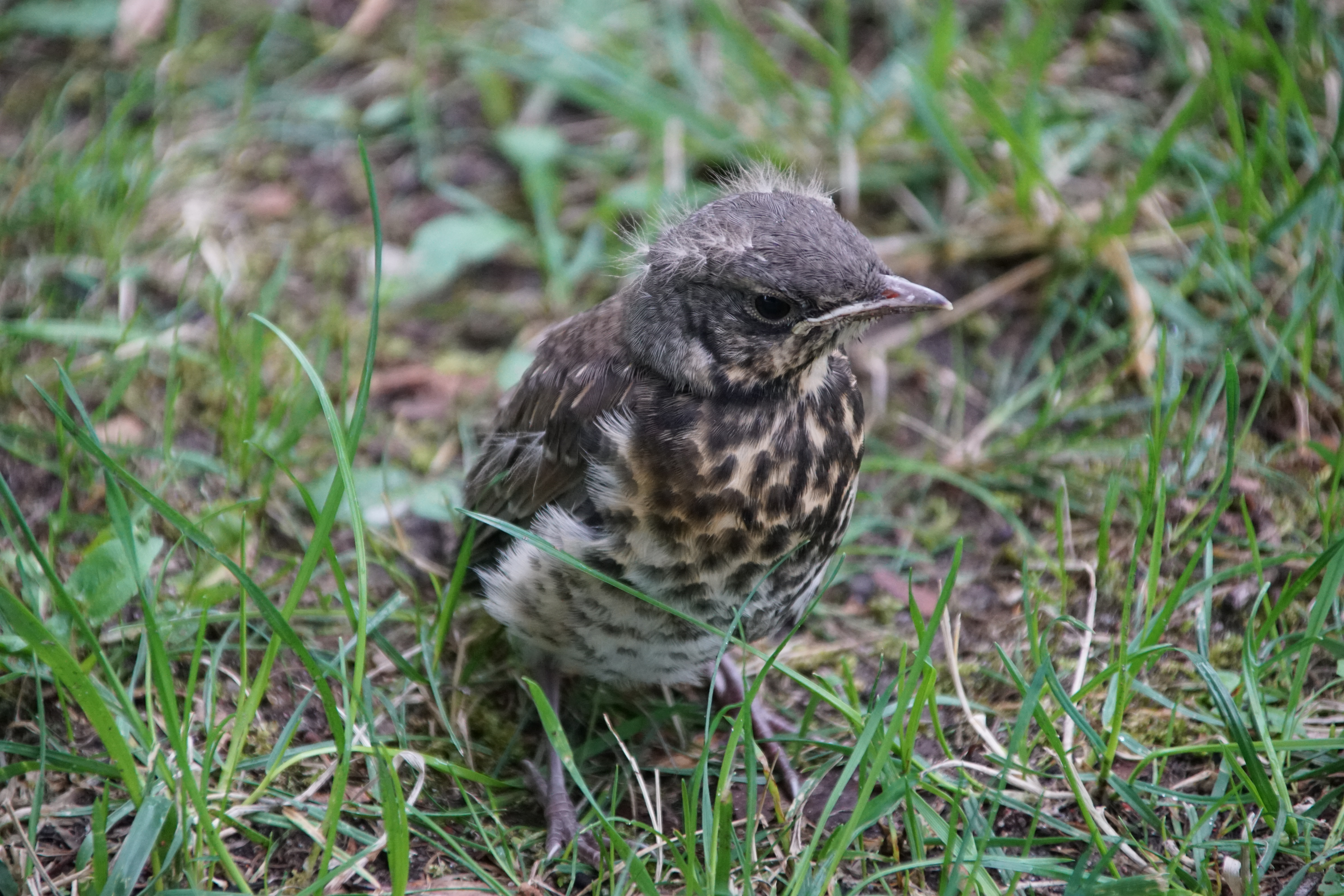 Turdus pilaris